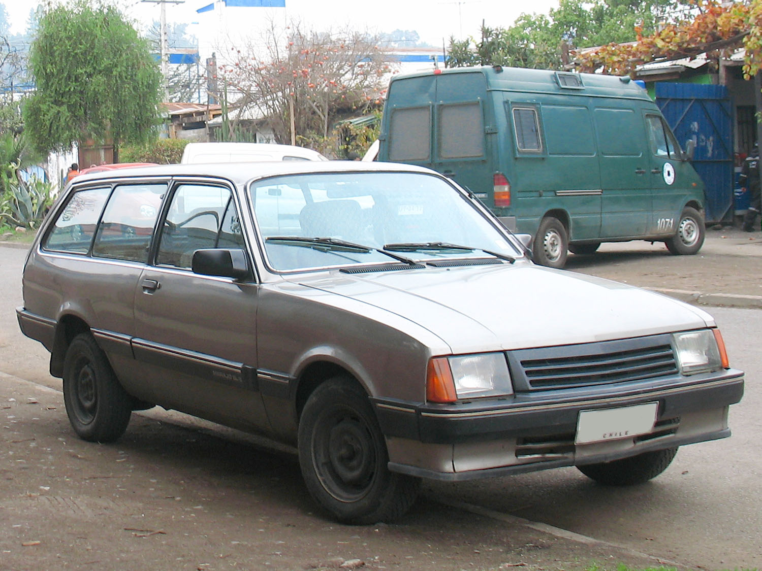 Marajó SLE